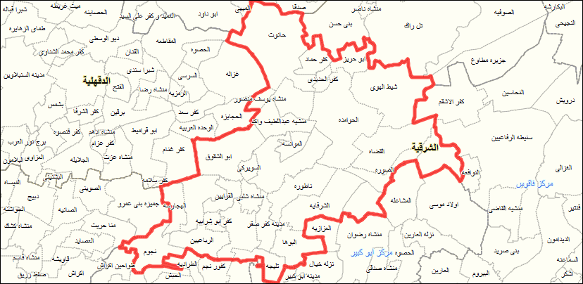 مركز كفر صقر